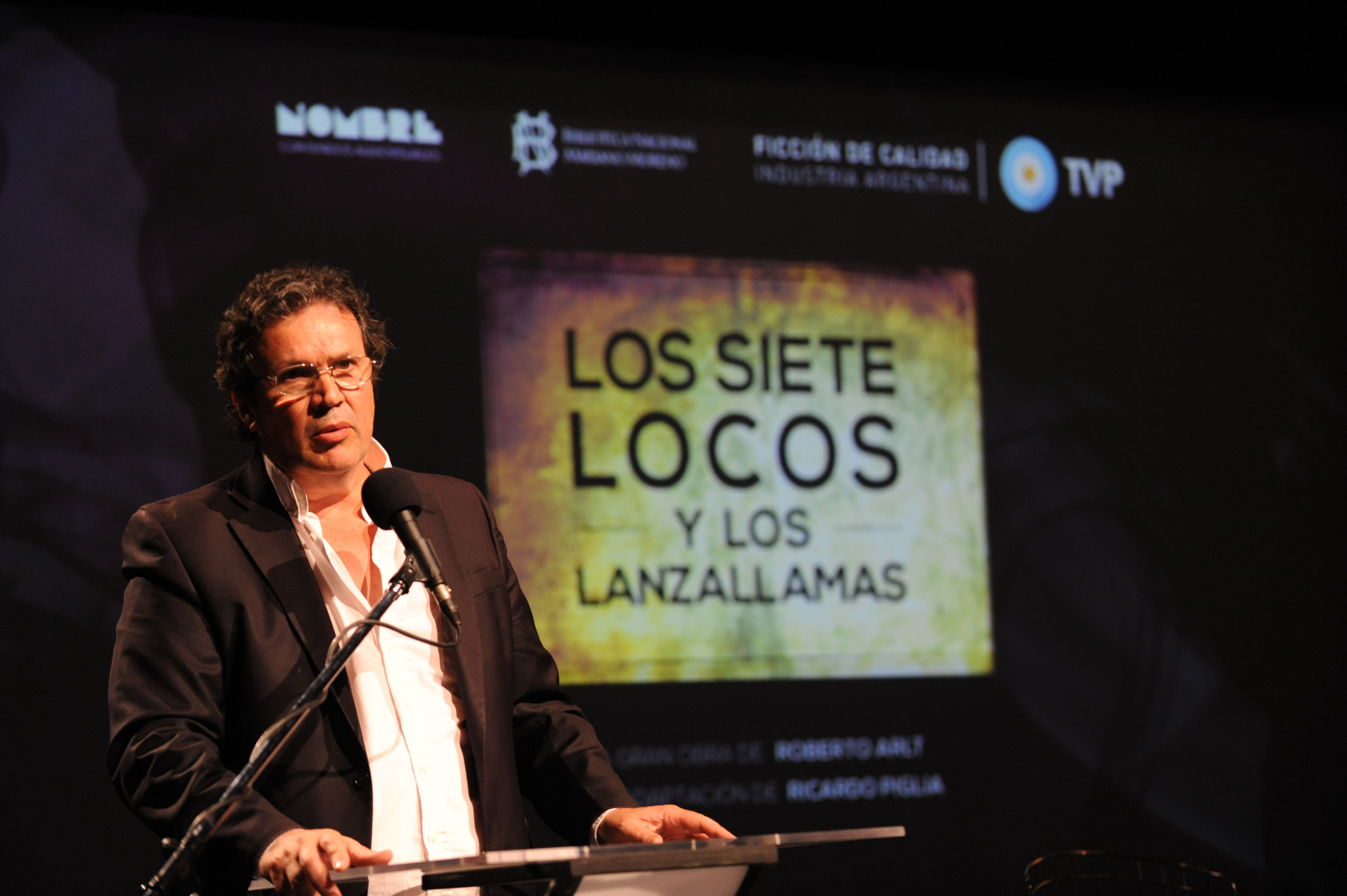 Tristán Bauer, cineasta argentino.